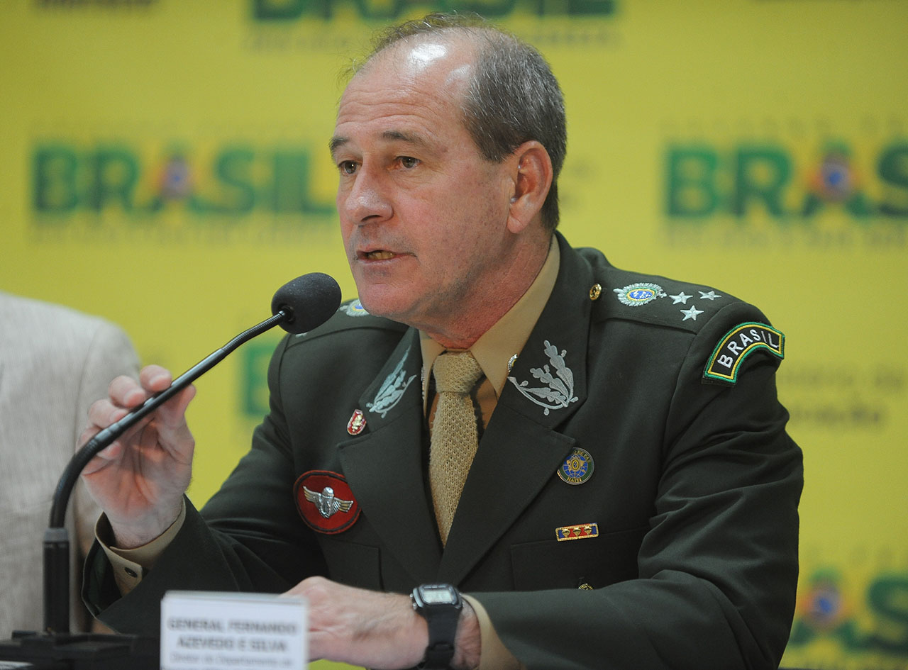 Dilma indica general Azevedo e Silva para autoridade olímpica